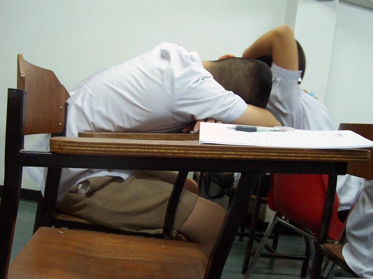 Sleeping when studying - Nakhon Sawan, Thailand